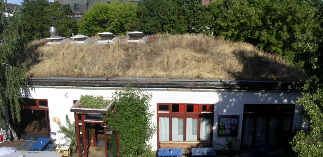 Cobertura verde - ufaFabrik - Berlim Verão 2006 Diogo Correia